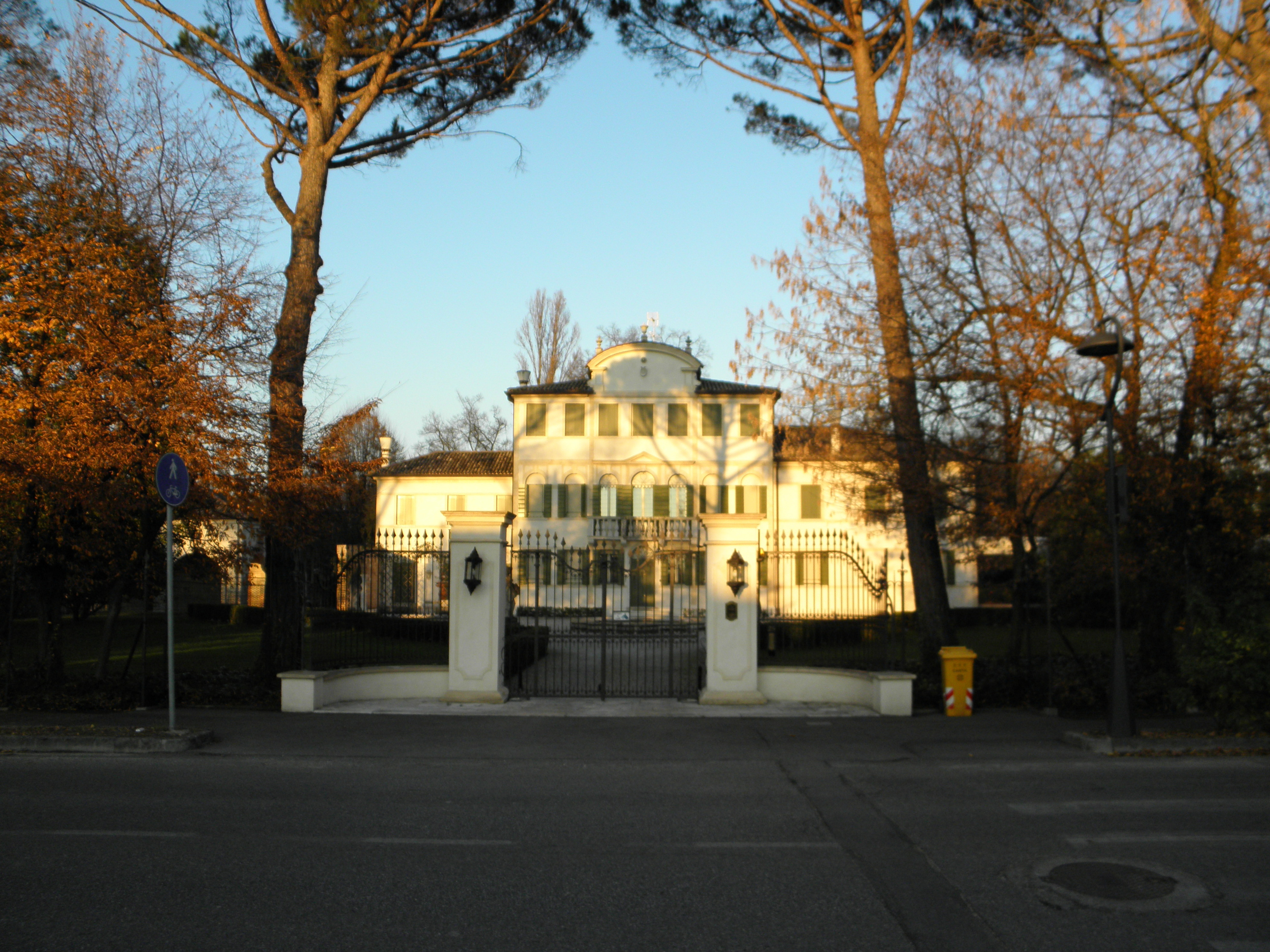 Spercenigo, frazione del comune di San Biagio di Callalta:Villa Marzotto Caotorta.